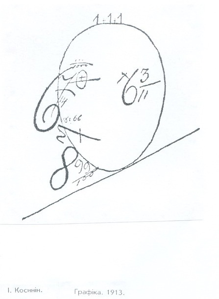 І. Косинін